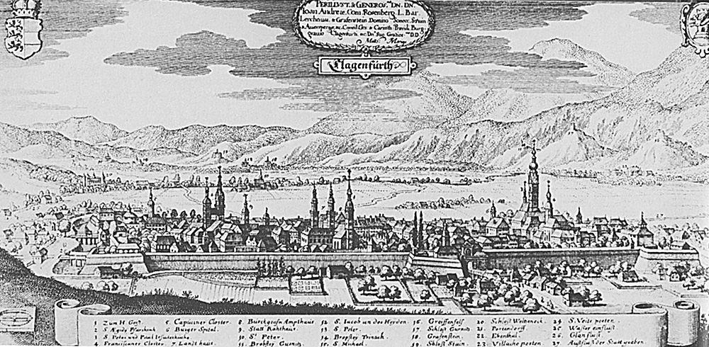 Klagenfurt, Ansicht vom Westen, von Matthias Merian, aus der "Topographia Provinciarum Austriacarum" 20:57, 4. Jan 2006 Eixi 1000 x 490 (311054 Byte) (* Bildbeschreibung: Klagenfurt, Ansicht vom Westen, von Matthias Merian, aus der "Topographia Provinciarum Austriacarum" * Scan: ~~~~)